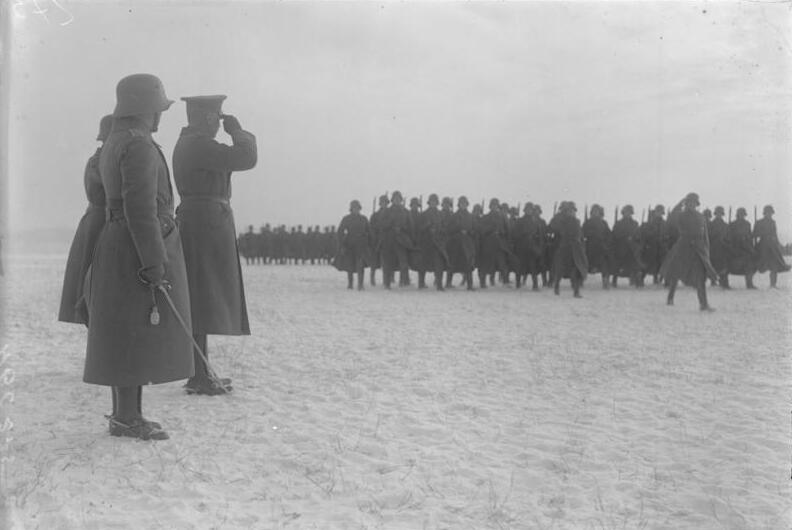 Besichtigung der Reichswehr durch General v. Seeckt in Weimar. Parademarsch der Reichswehr vor General v. Seeckt.